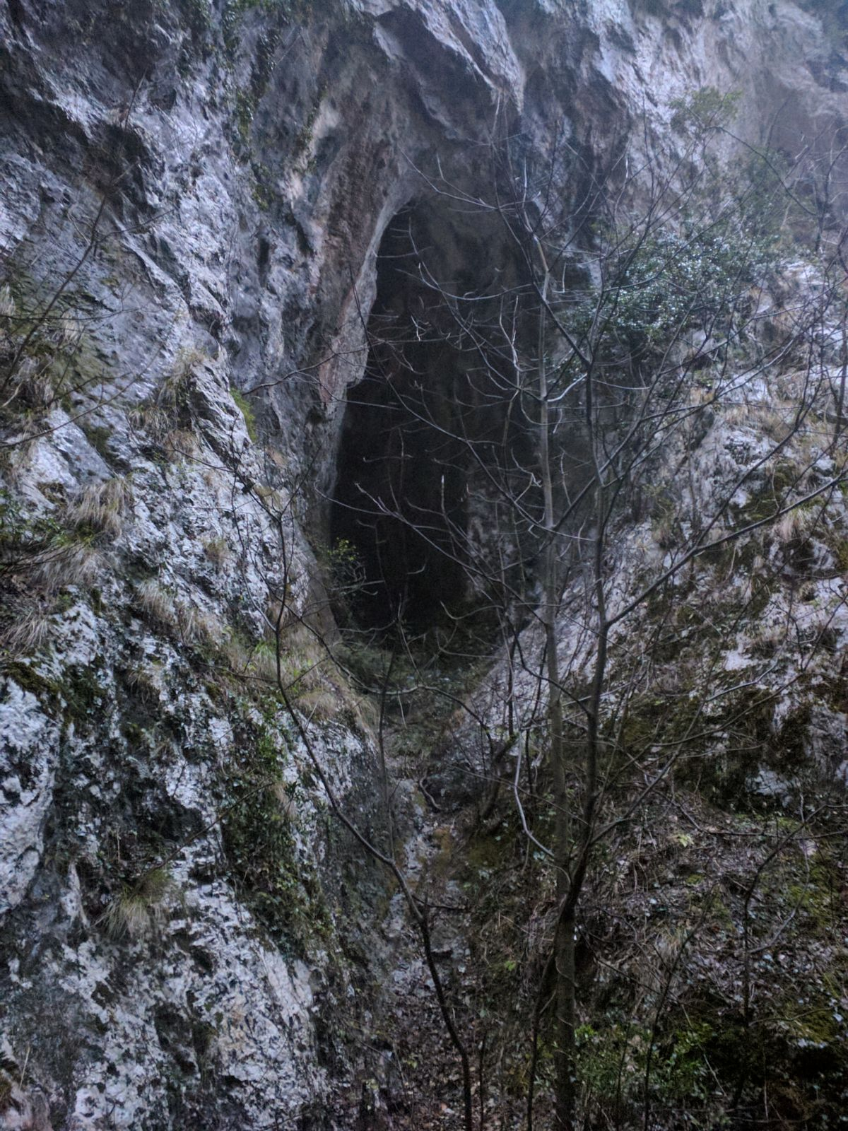 Fenditura nella roccia anticamente frequentata dall'uomo preistorico.